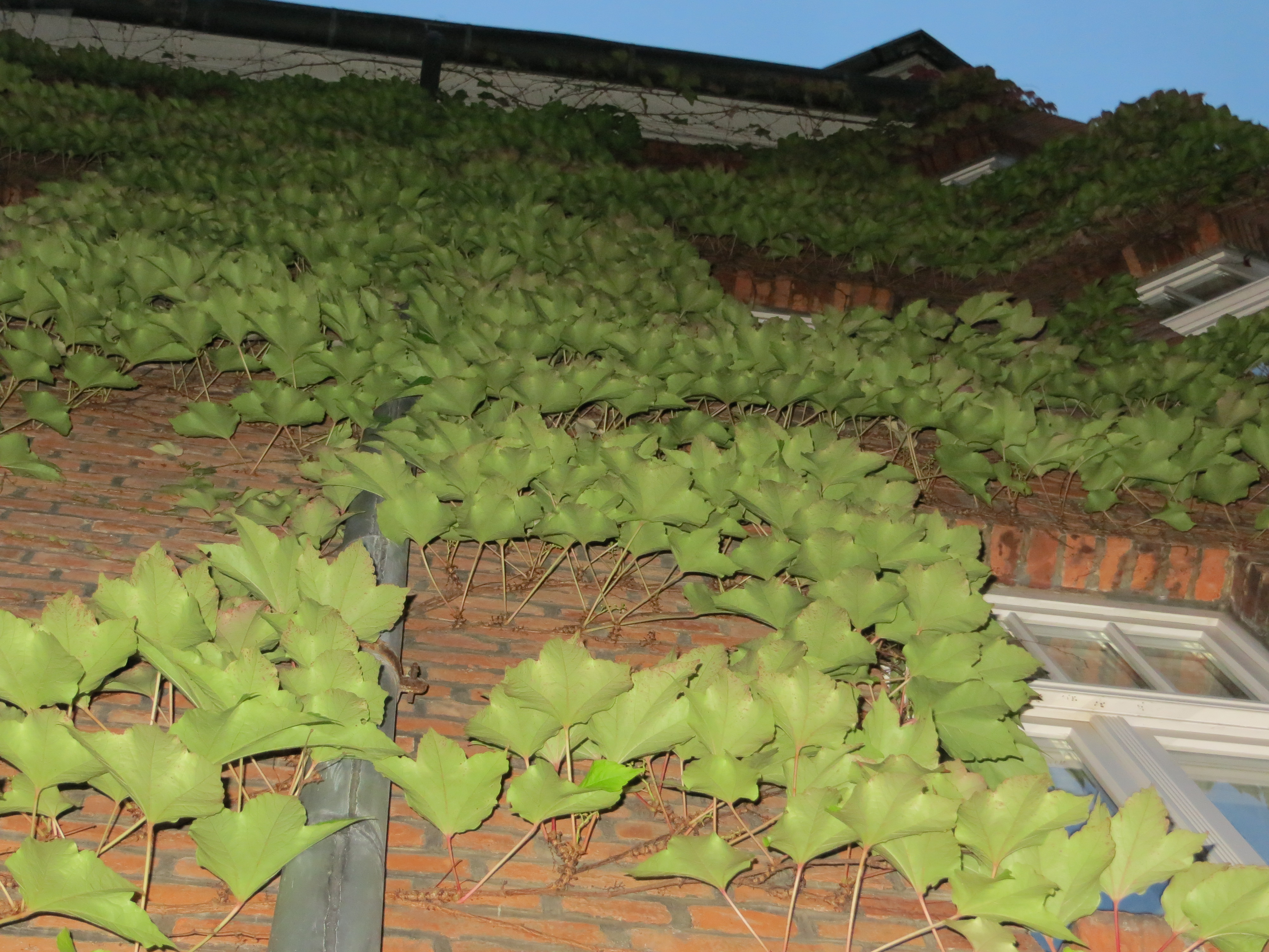 Burghof, Flensburg, Innenhof, Efeu, Bild 01